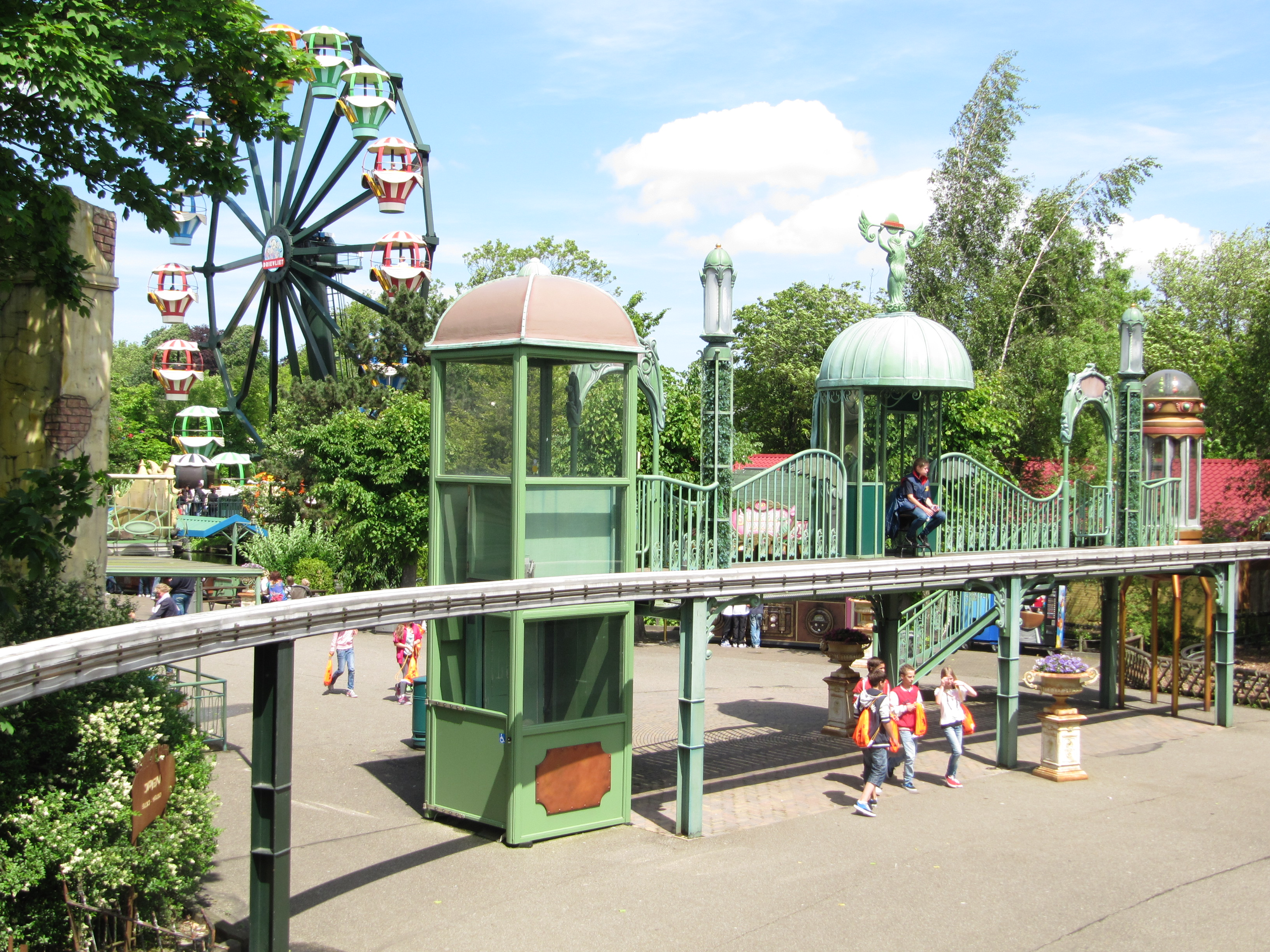 Familiepark Drievliet. Monorail station